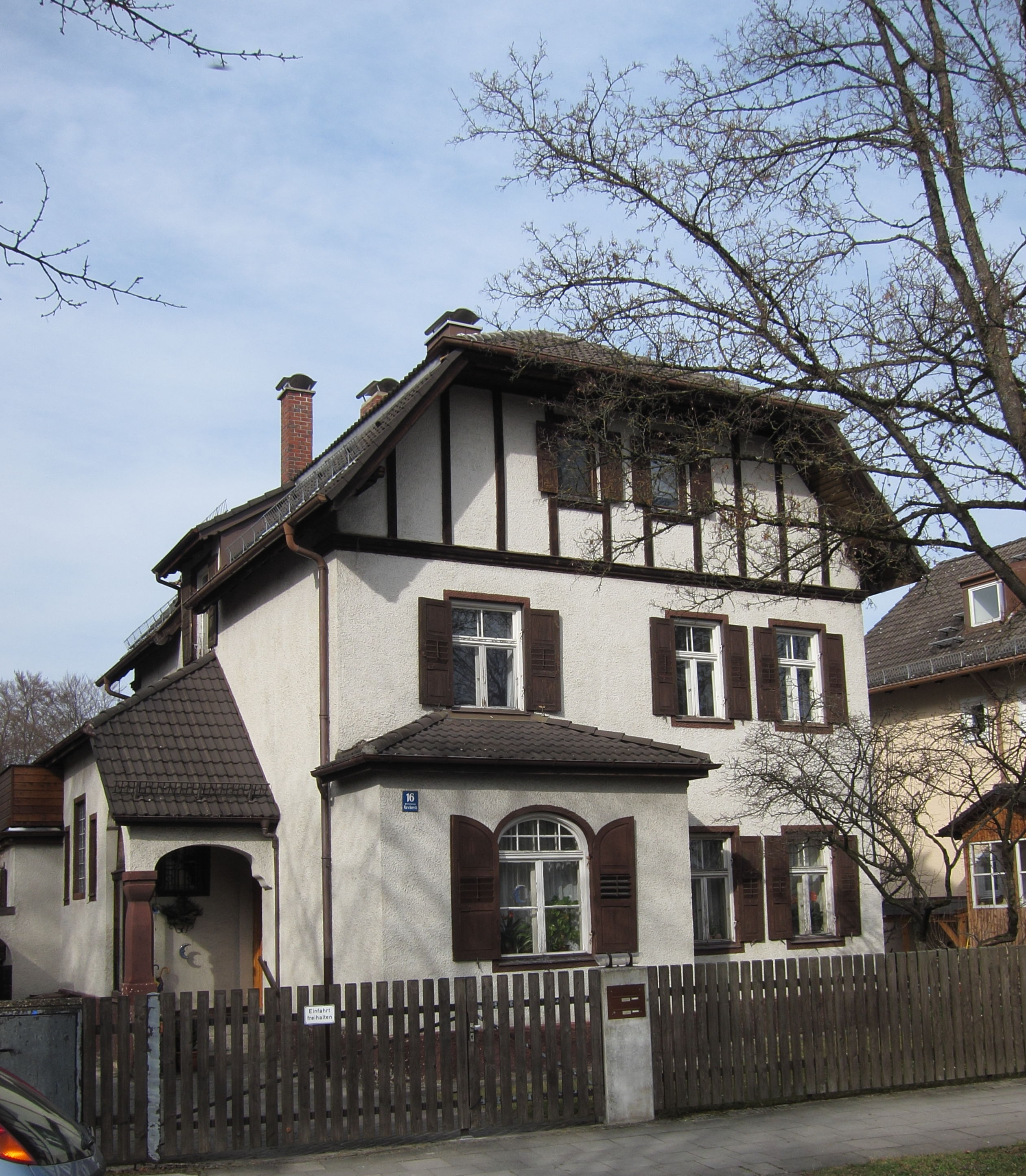 Marschnerstraße 16; Villa, Landhausstil, um 1897/1900 aus dem Büro August Exter.